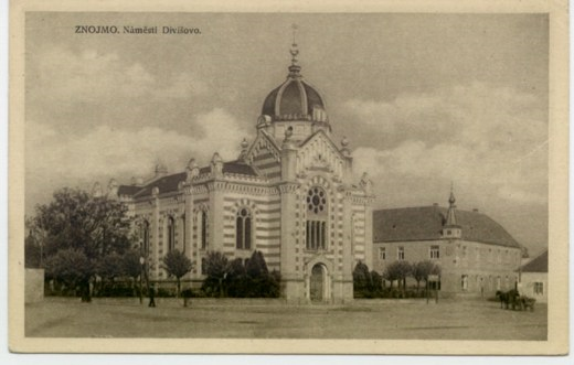 Synagoge in Znojmo